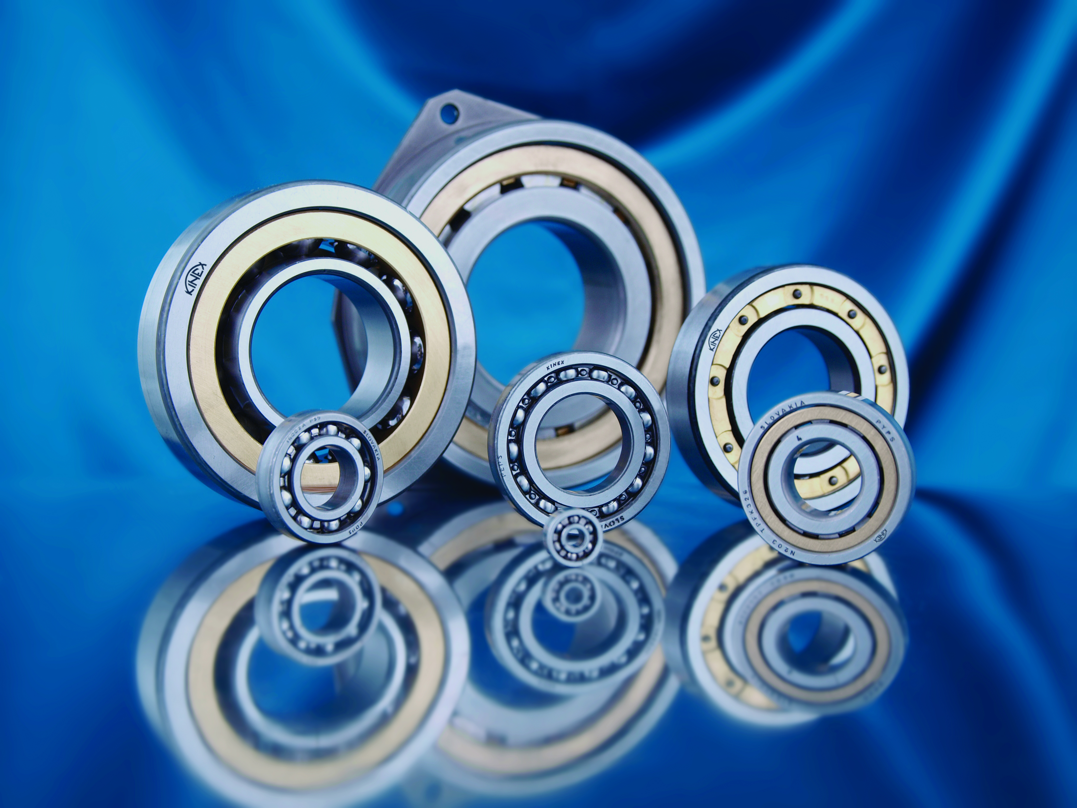 Letecké ložiská